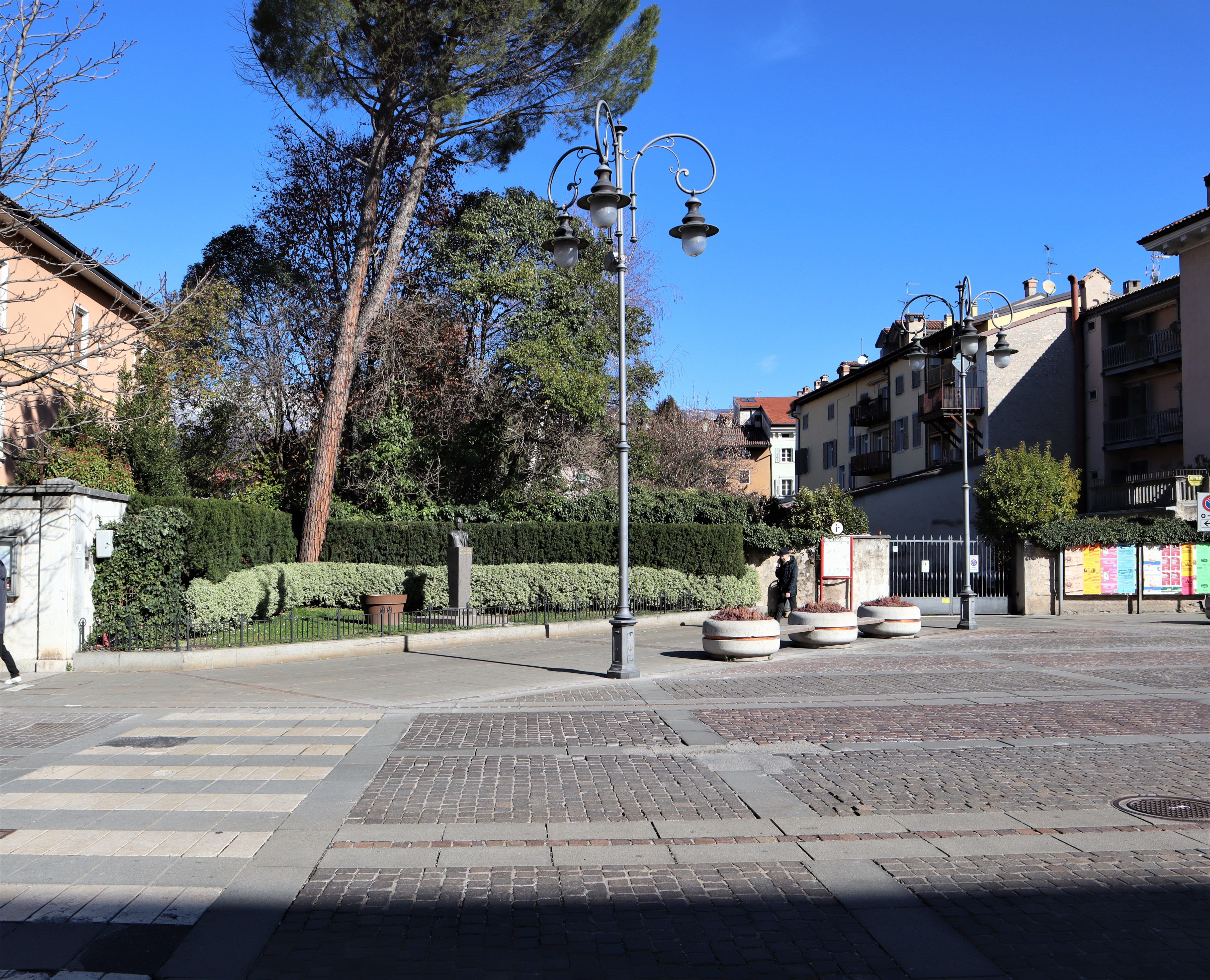 Corso Rosmini. Piazza Rosmini e monumento a Riccardo Zandonai